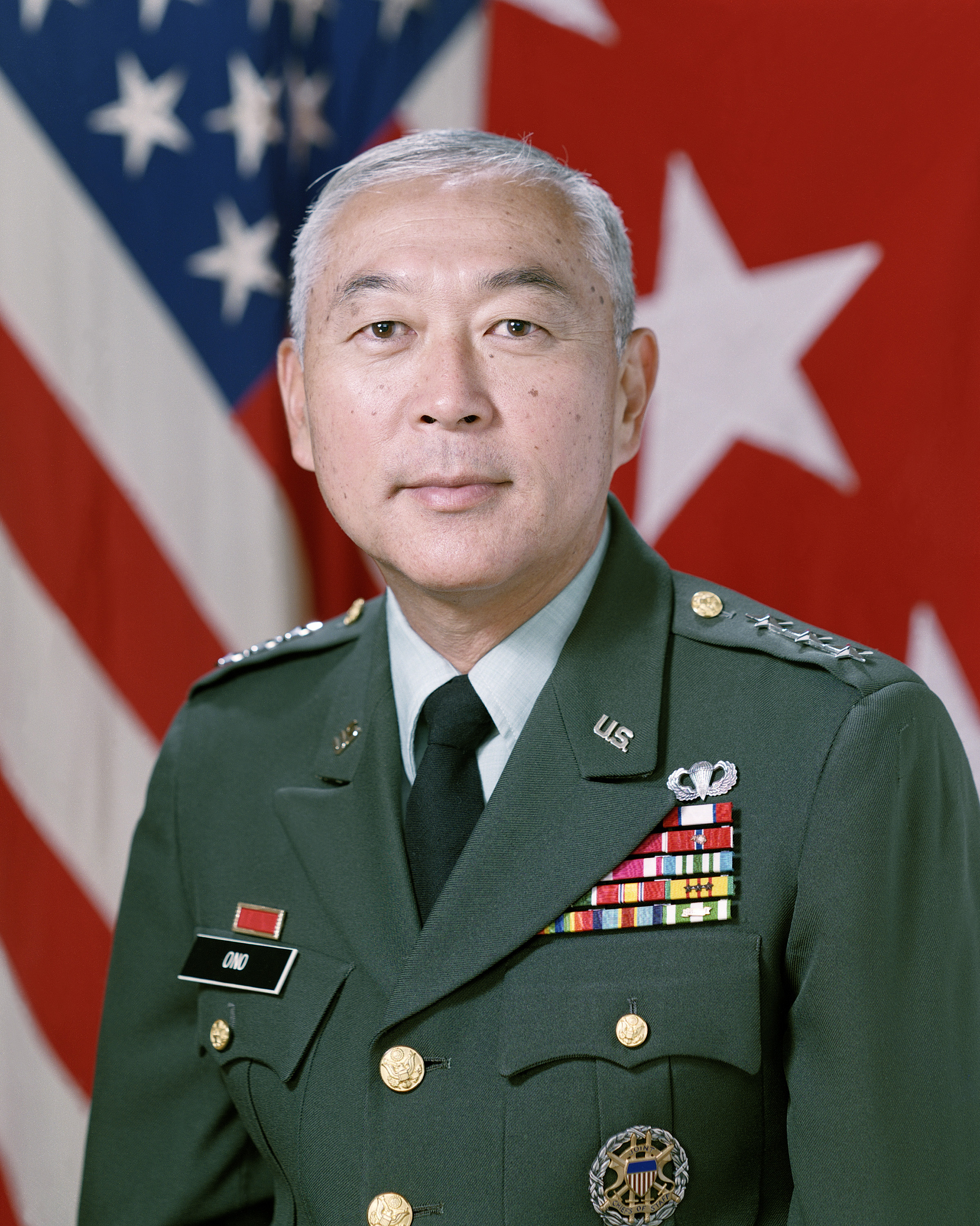 Lieutenant General Allen K. Ono